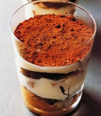 Tiramisu strata, March 2008